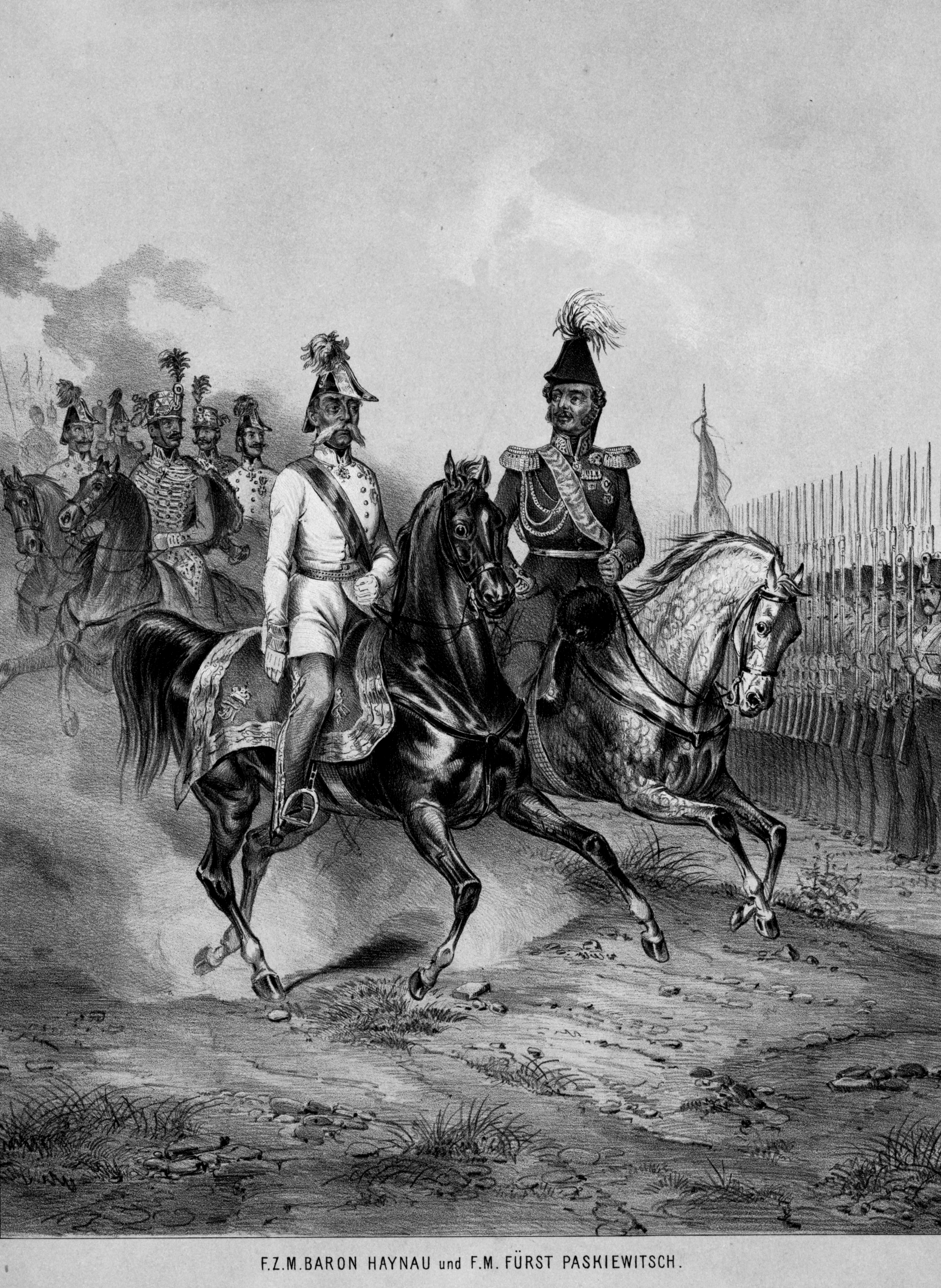 Haynau osztrák hadvezér és Paszkevics orosz tábornagy az 1848–49-es szabadságharc ellen fellépő cári hadsereg főparancsnoka Világosnál